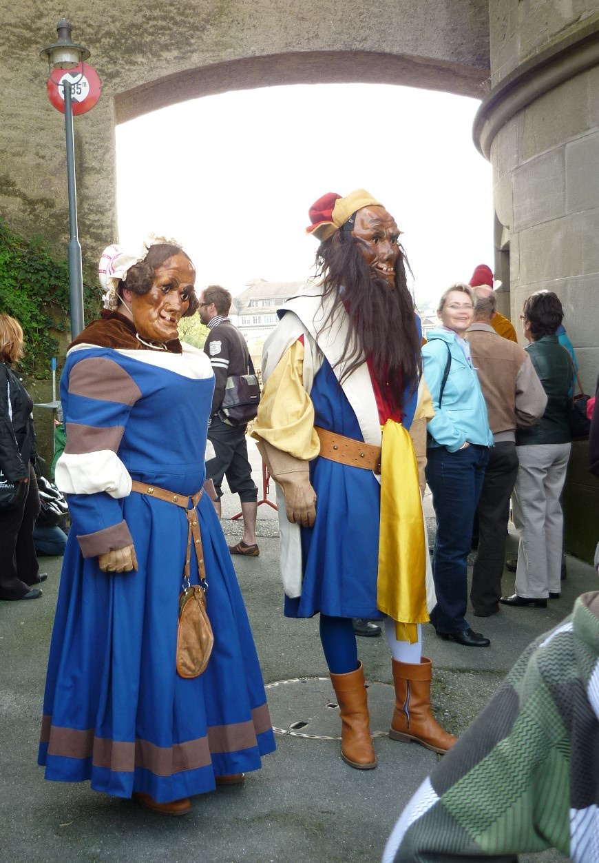 Bruder Fritschi und Fritschine, Fasnacht Luzern, Schweiz